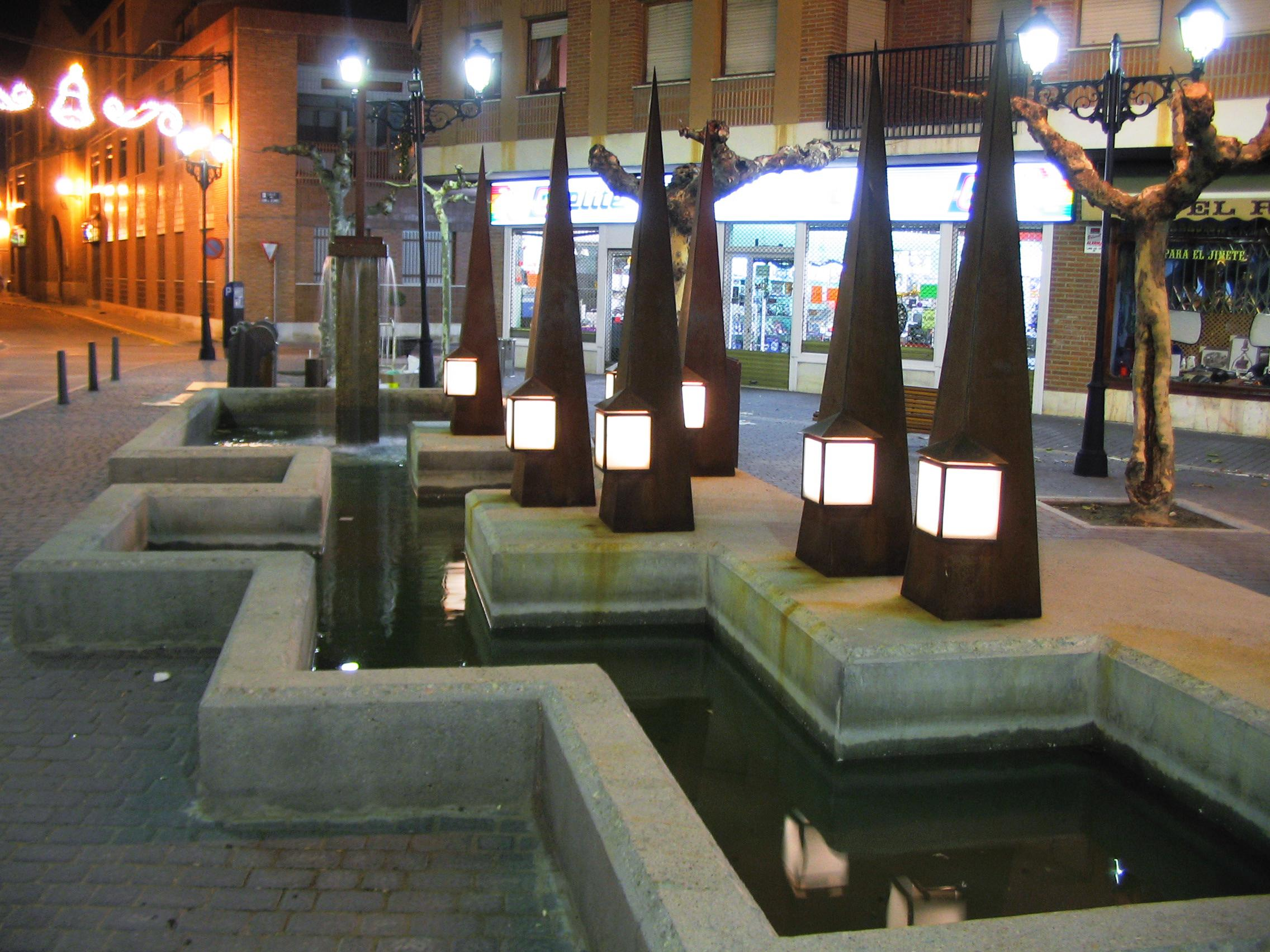 Fuente conmemorativa de la Semana Santa medinense.